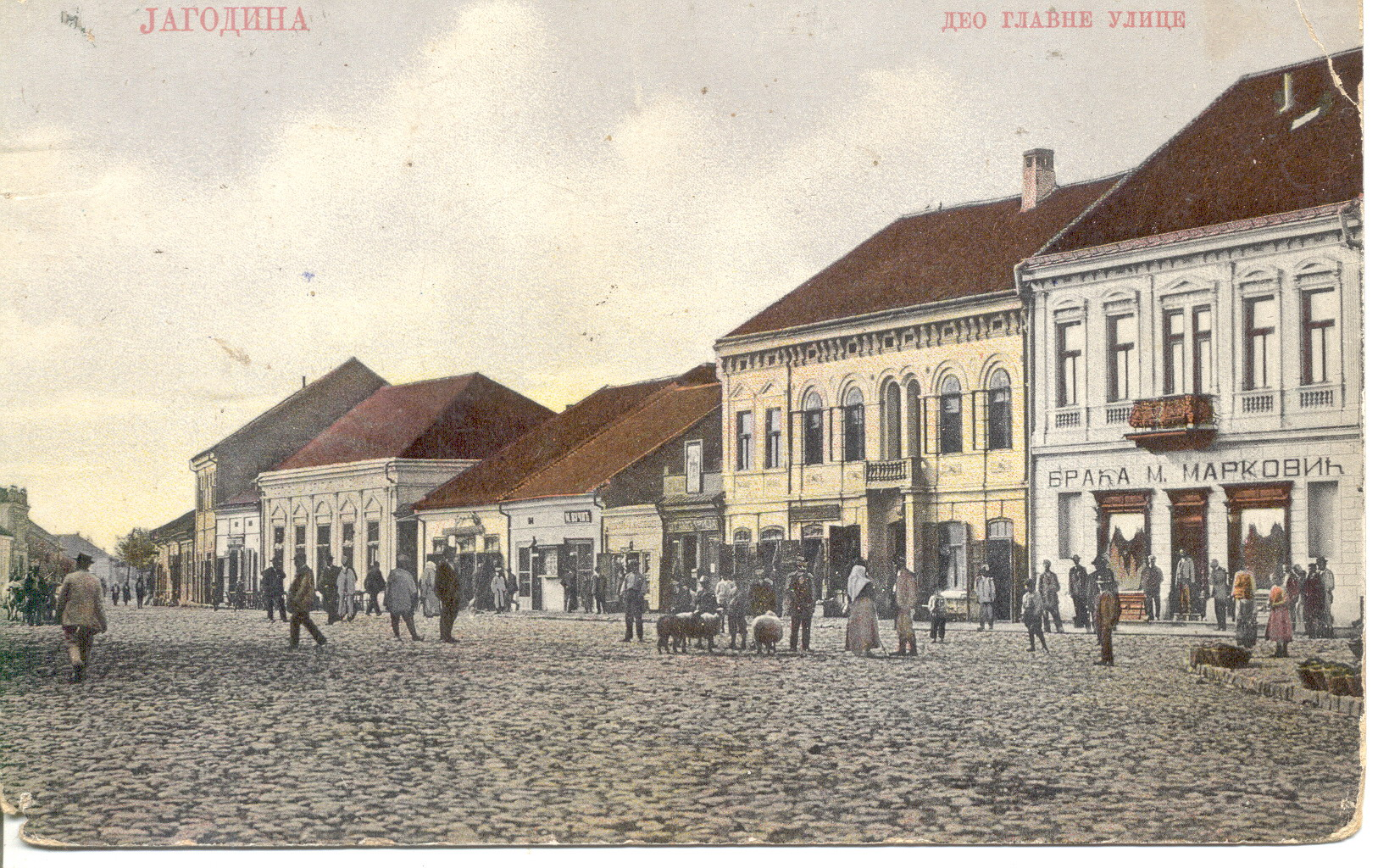 Стара разгледница Јагодине на којој су две зграде у којима је сада смештена Народне библиотека у Јагодини.